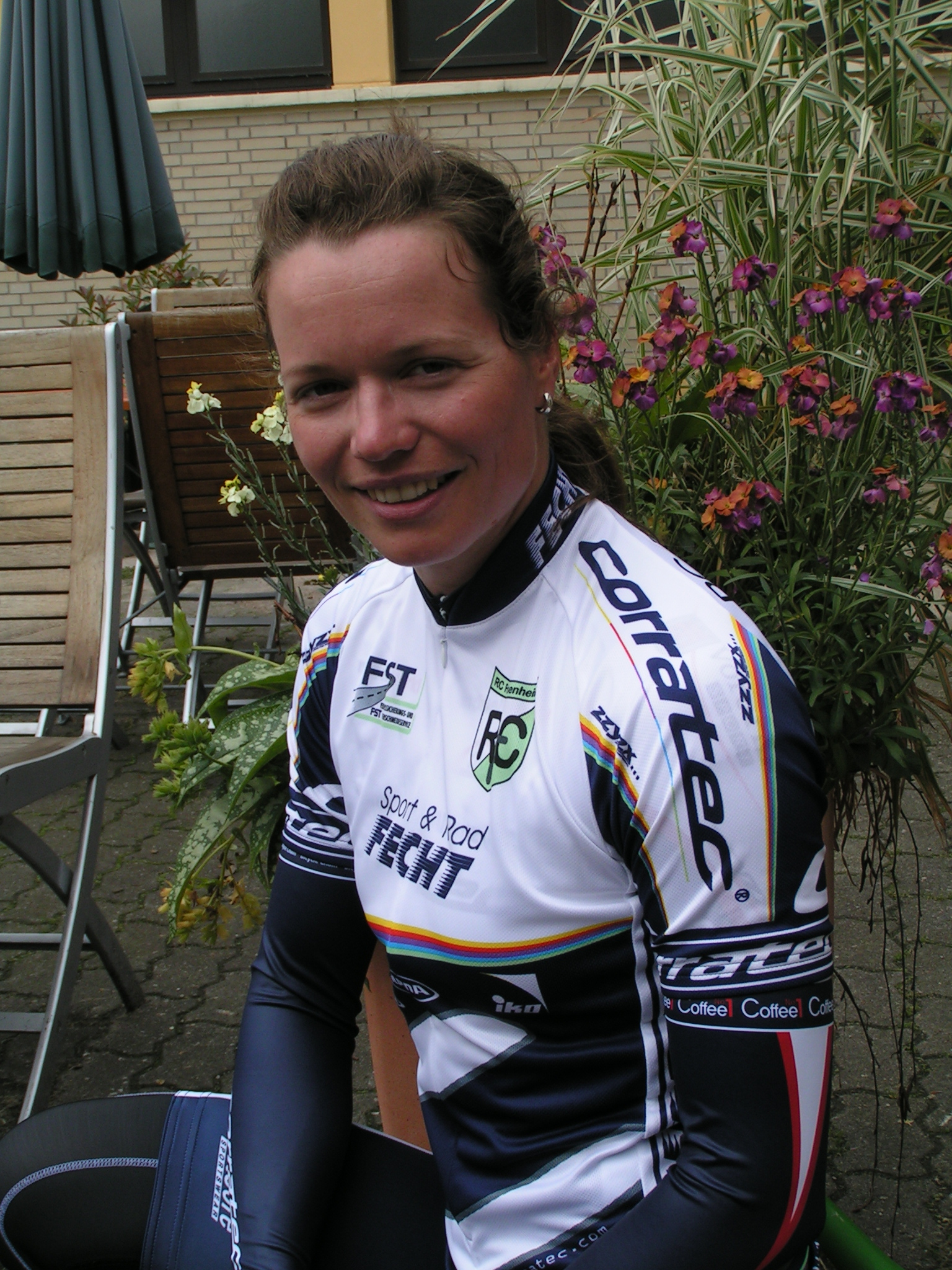 Verena Jooß im Trikot des RC 1899 Friesenheim